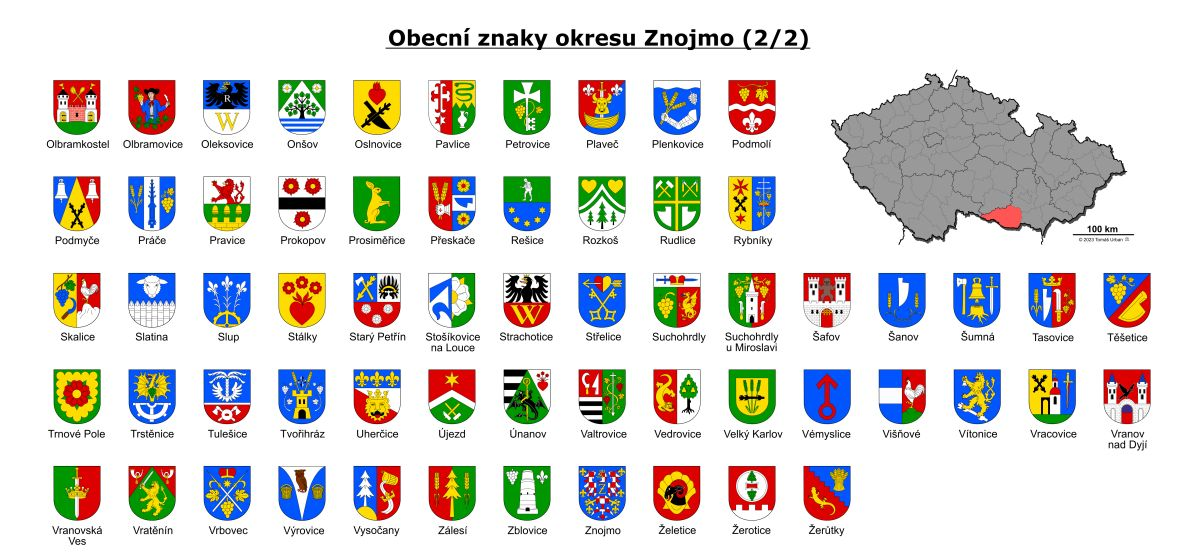 rozdělení + znak obce Plaveč